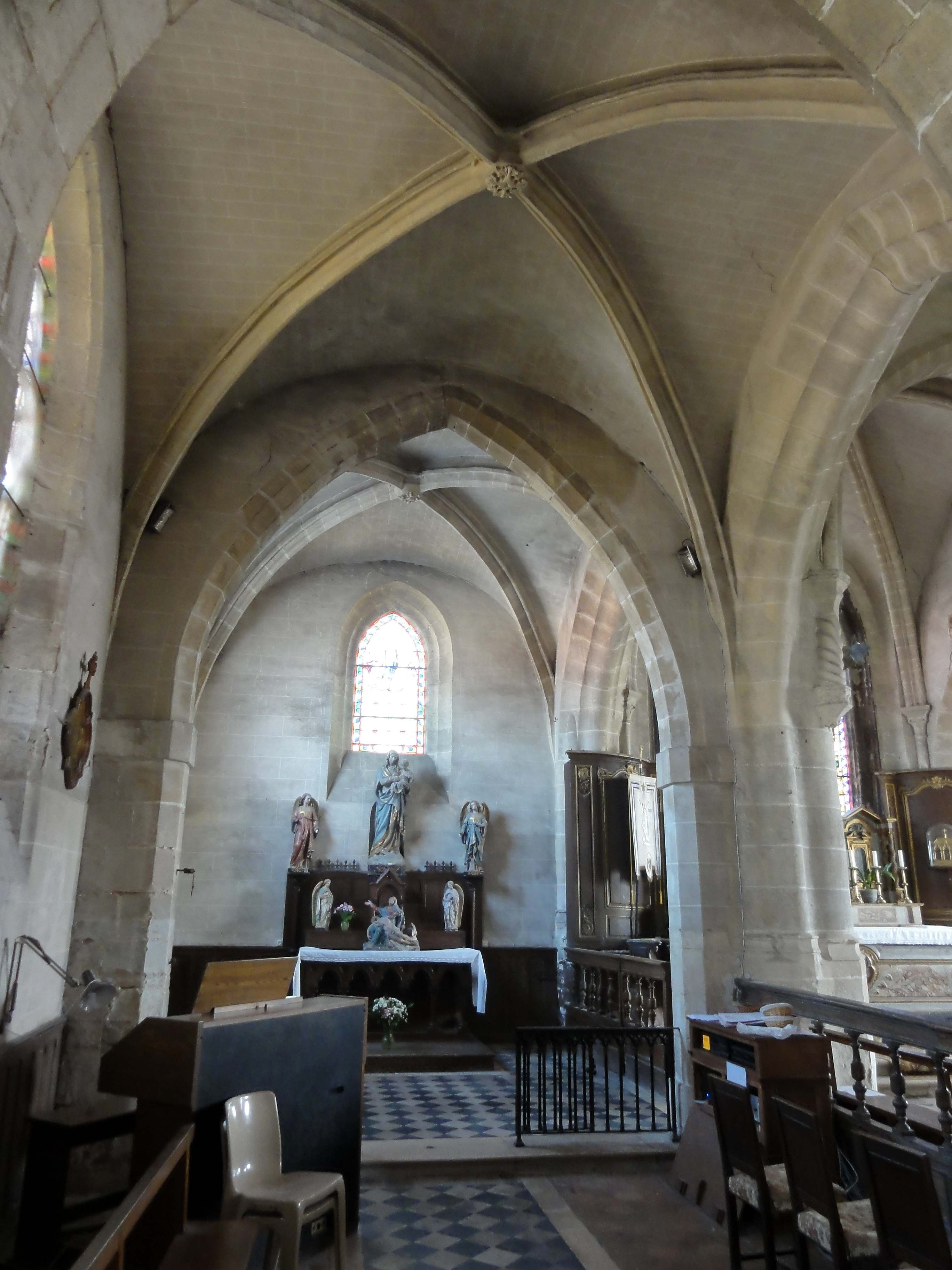 Intérieur de l'église (voir titre).